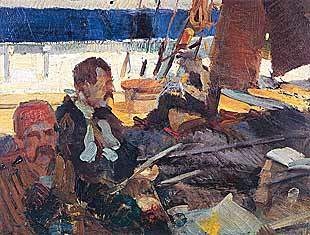 Men on Deck